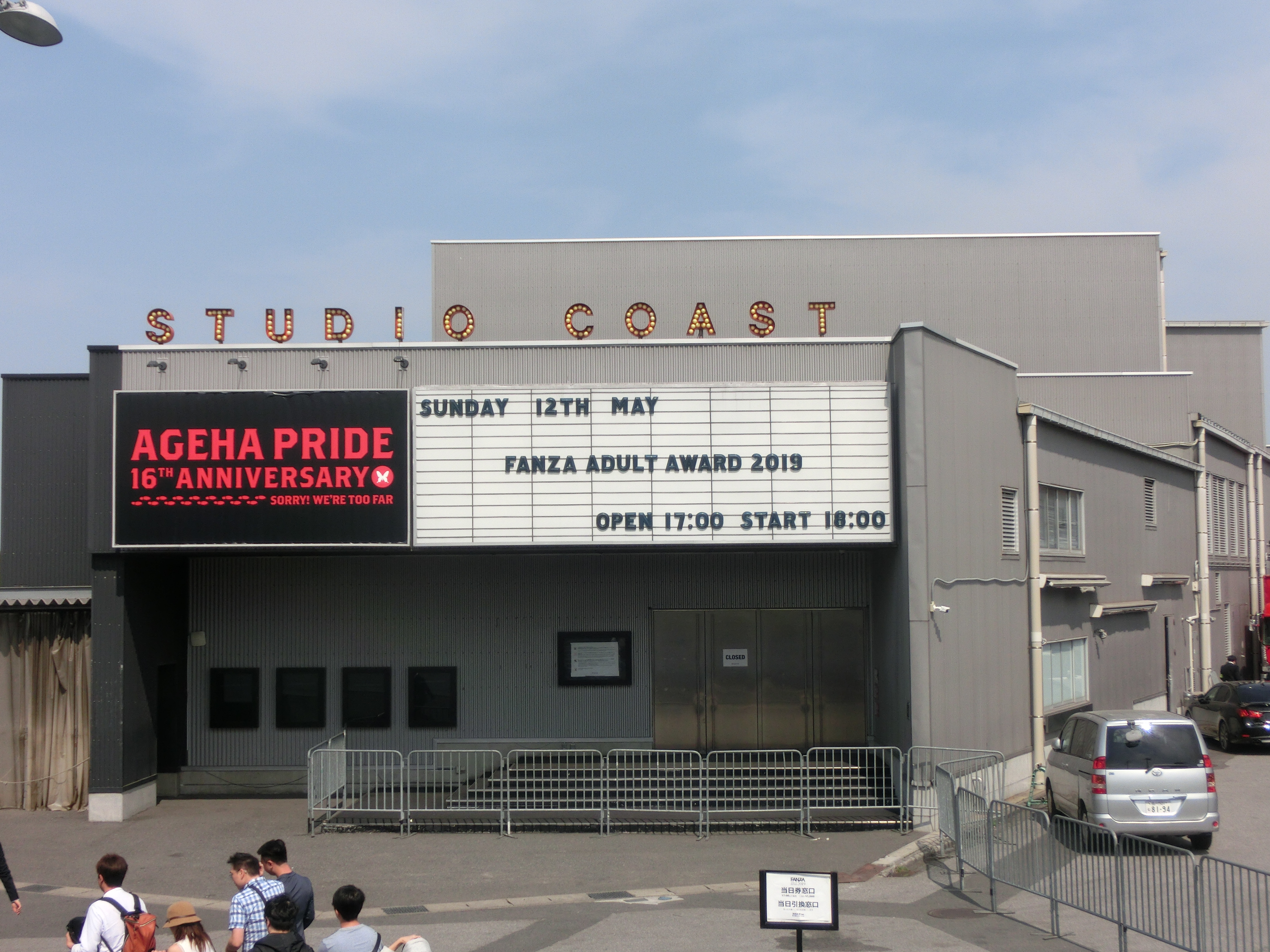 新木場周辺